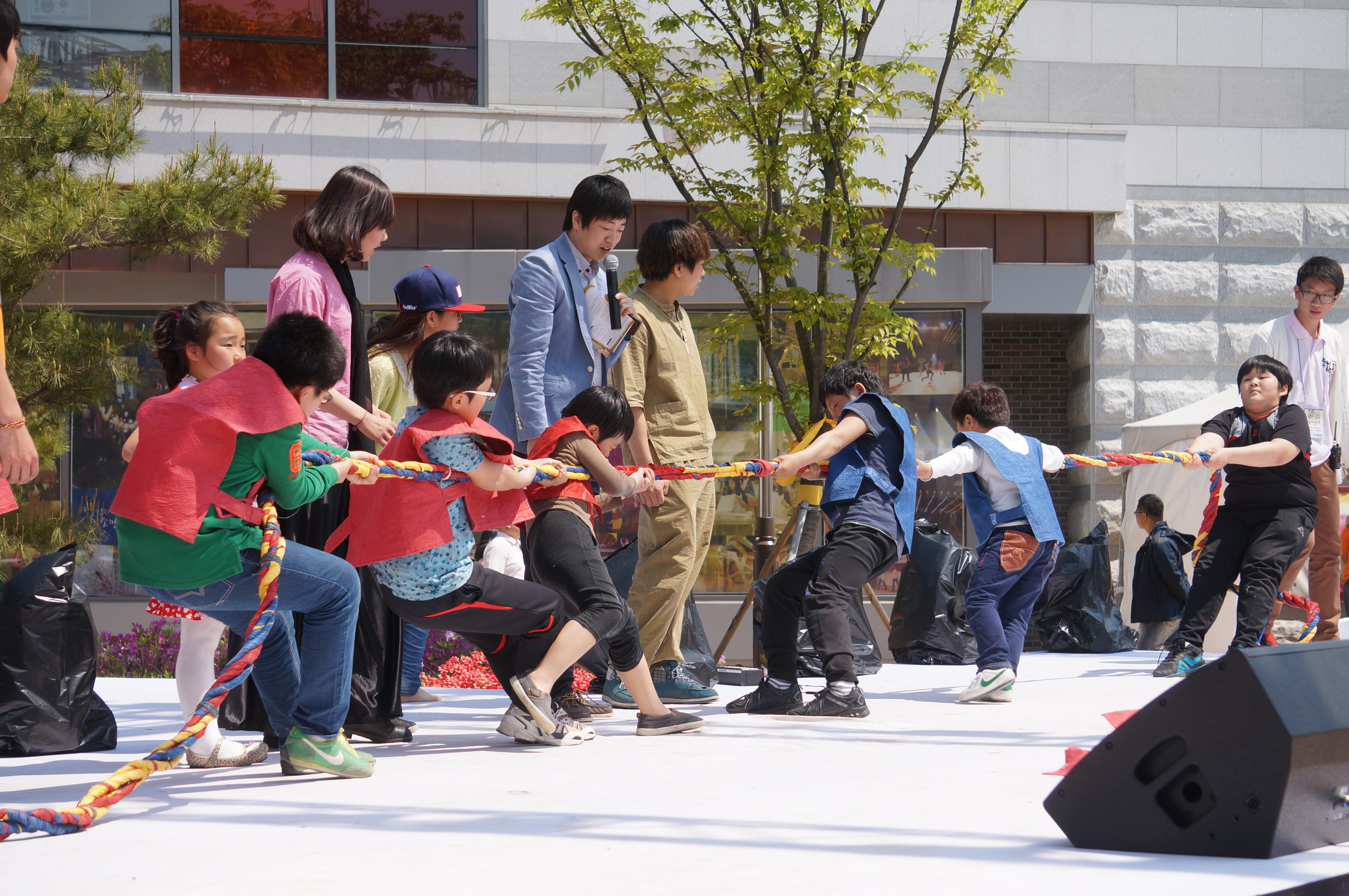 지승줄다리기